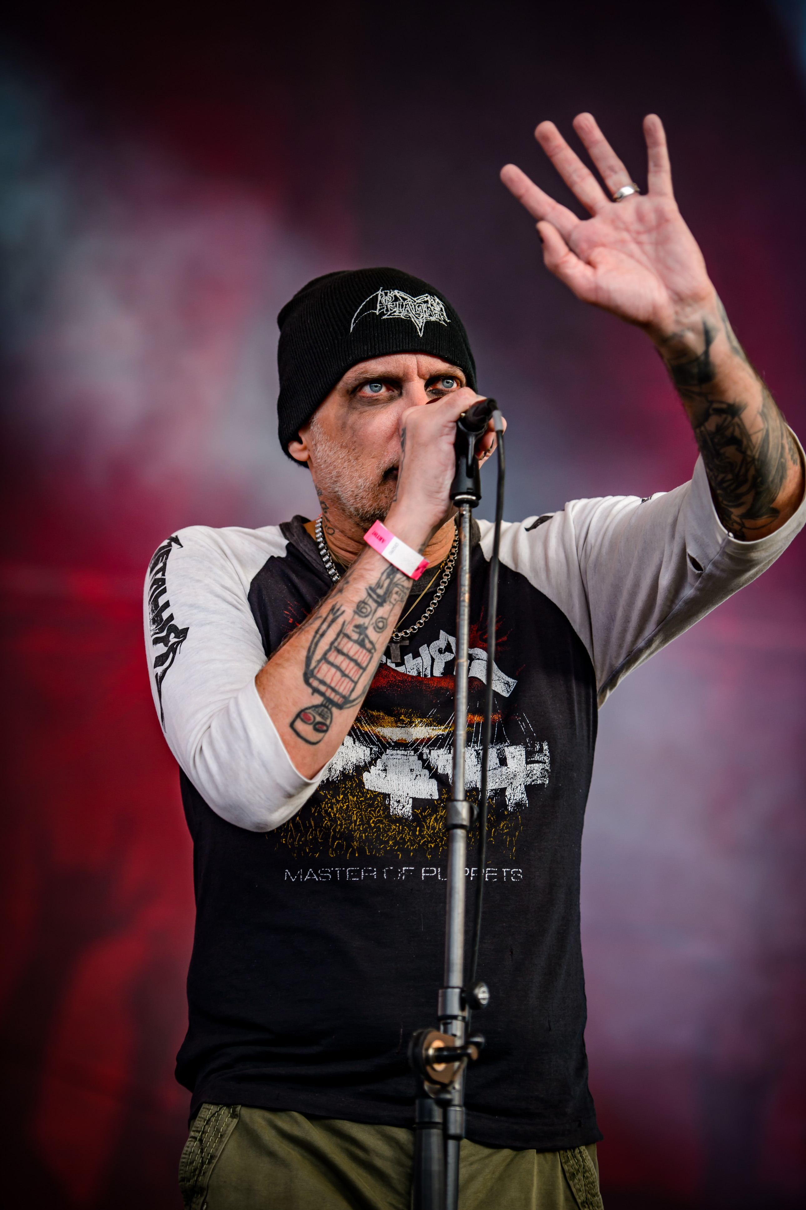 'Rock Hard Festival 2018; Amphitheater Gelsenkirchen': 'Tiamat'